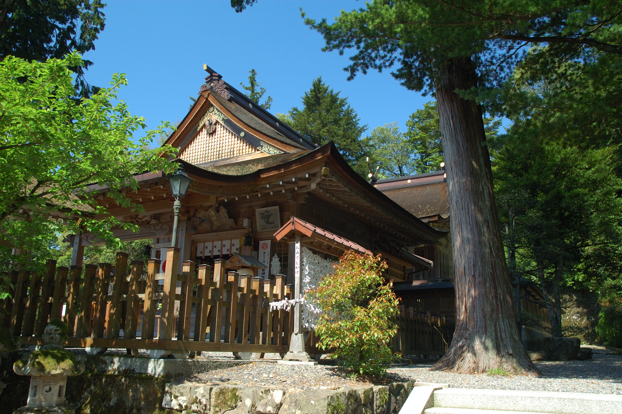 Ube jinja a front shrine